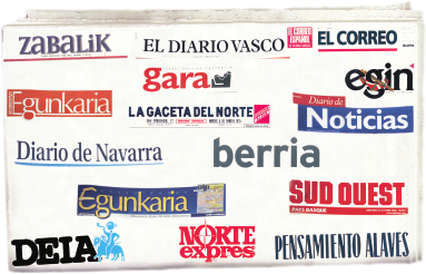 Euskal Herriko egunkariak.